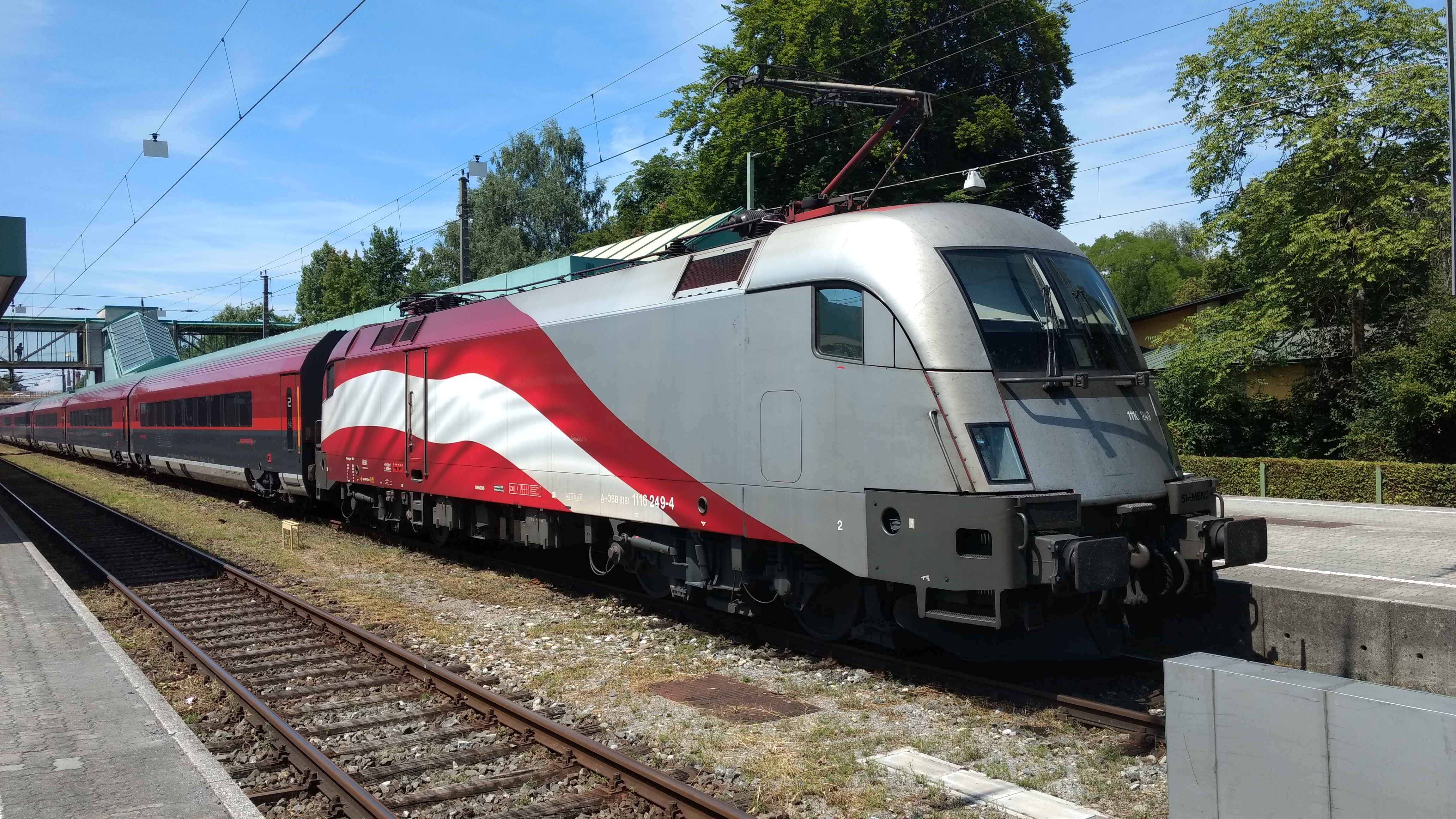 1116.249 in Bregenz